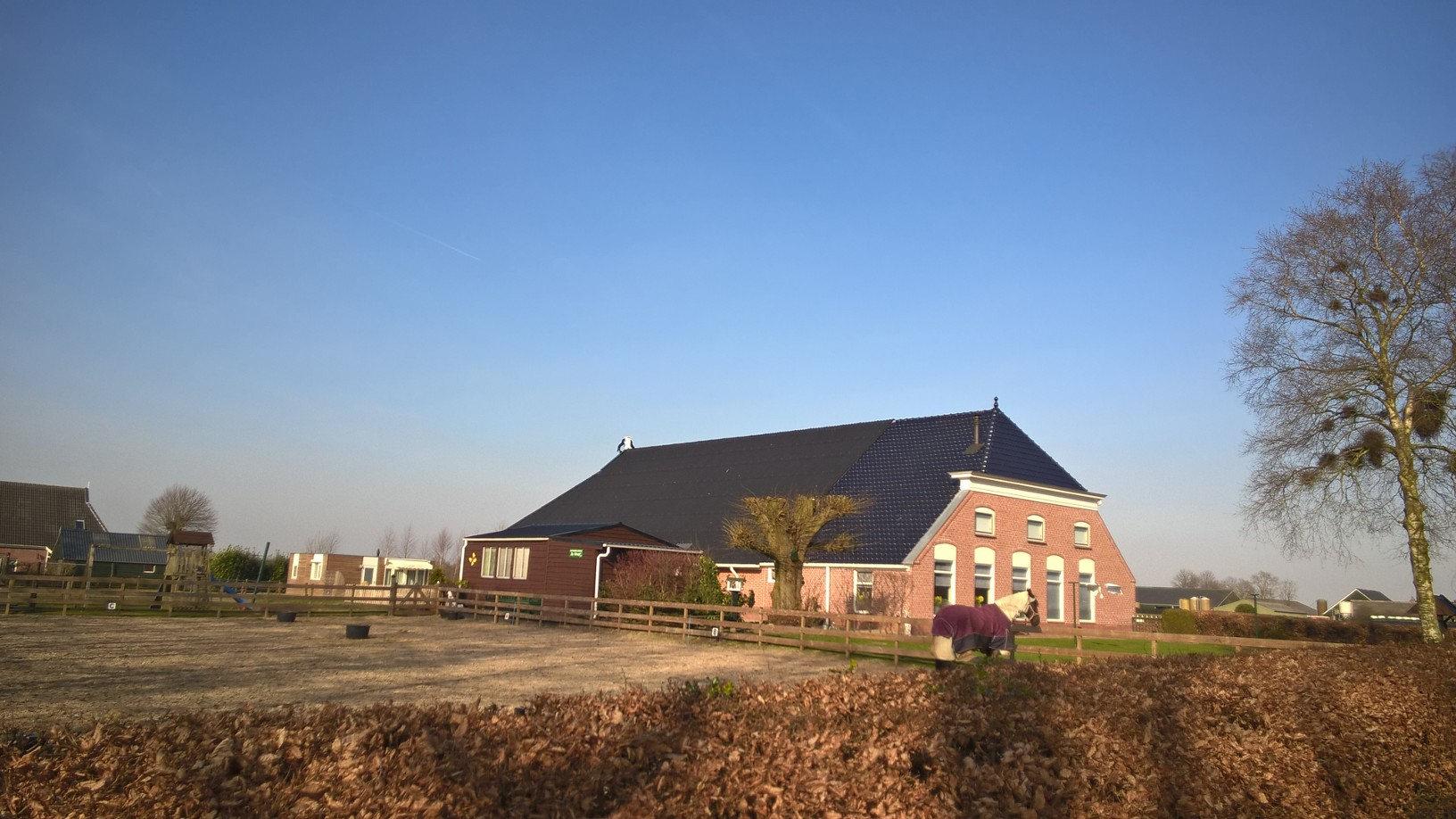 Voormalige manege op De Linde, van 1972 tot 2011 in gebruik door PSV Mazeppa, Marum.